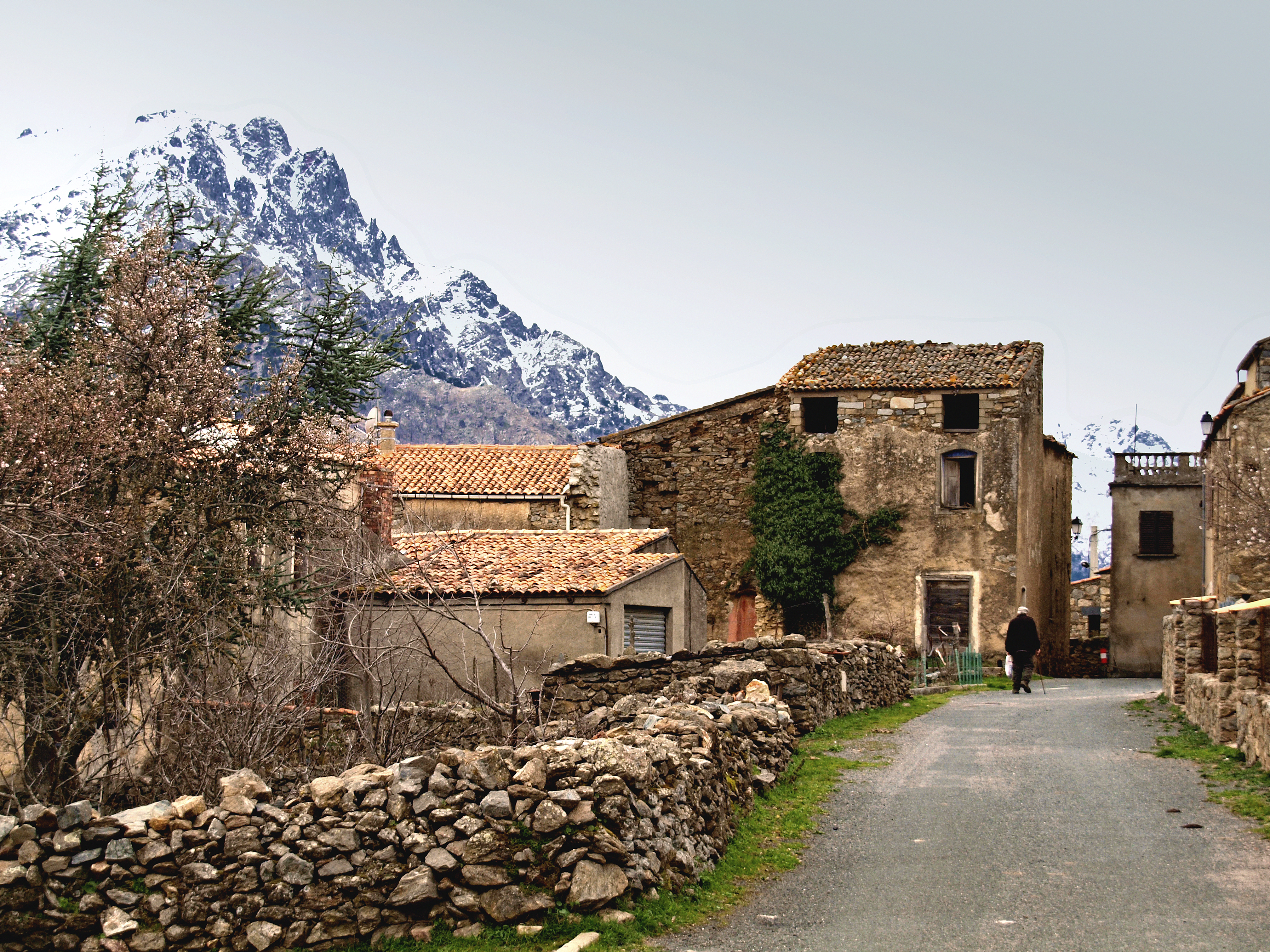 Vallica (Corsica) - Le village et le Monte Padro